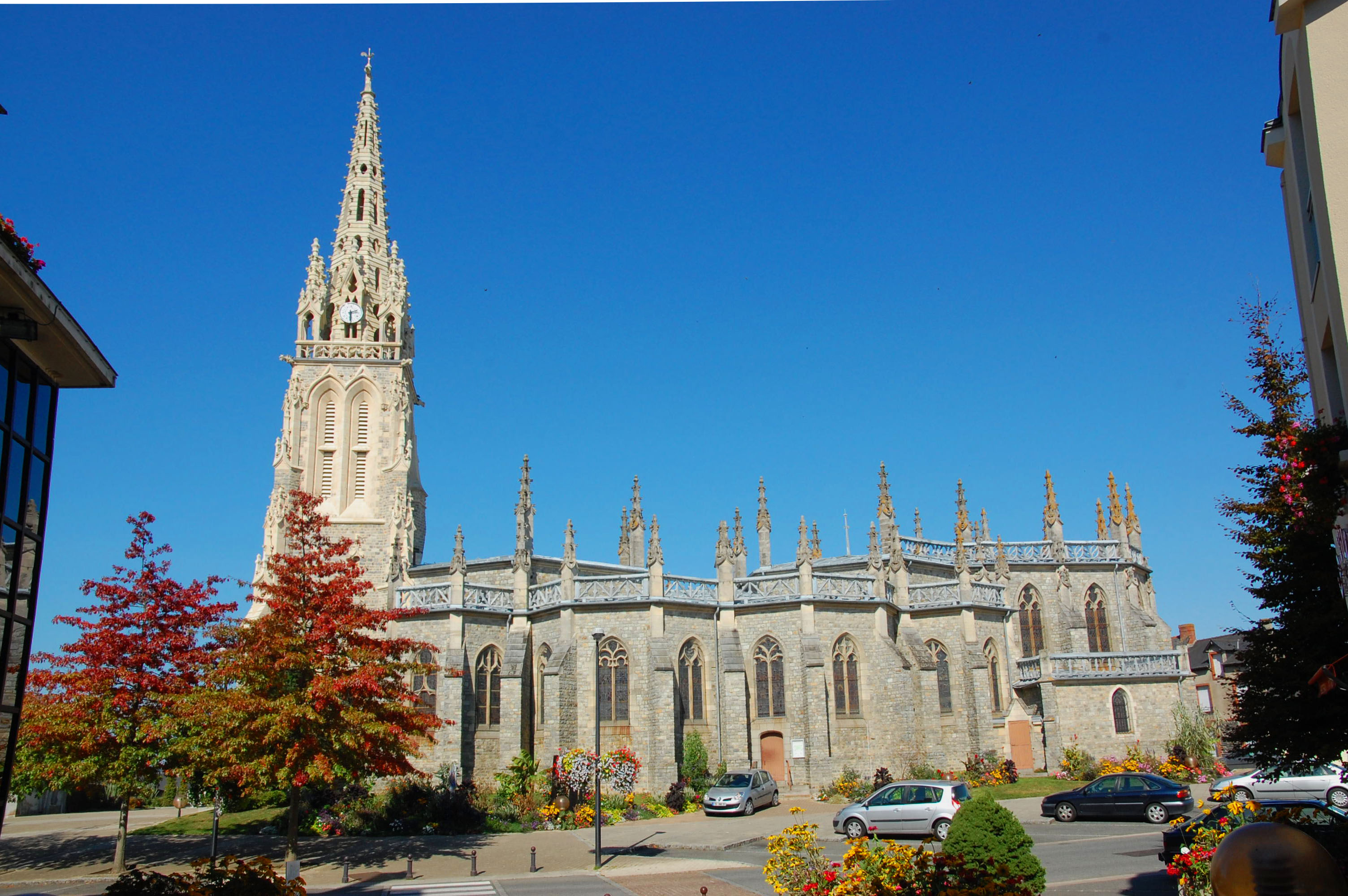 Eglise Saint-Pierre, Noyal-sur-Vilaine (35)